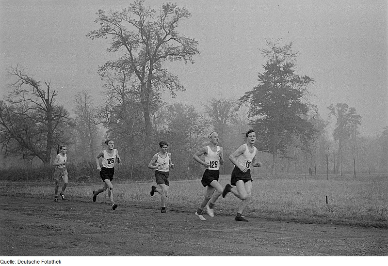 Original image description from the Deutsche FotothekSchüler beim Waldlauf